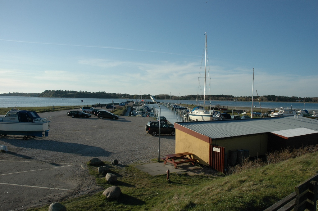 Kulhuse havn